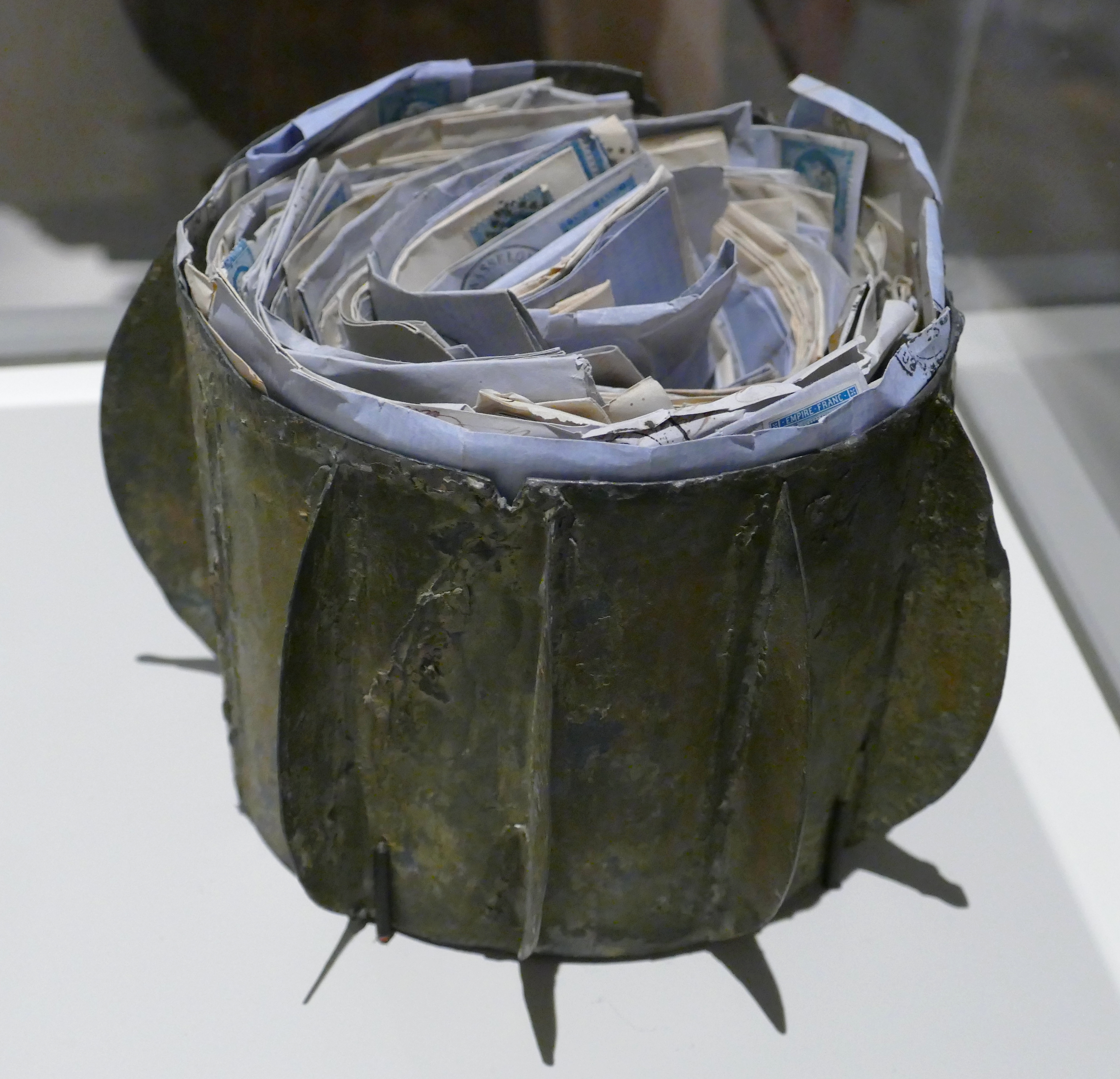 Une Boule de Moulins exposée au musée de l'Armée (prêtée par le Musée Postal). Exposition France-Allemagne(s), 1870-1871, La guerre, la Commune, les mémoires. 13 avril-30 juillet 2017.